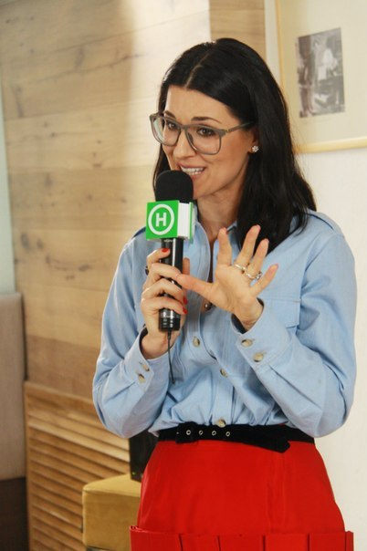 Это фото было сделанно на мой личный фотоаппарат во время фан-встречи с Машей Ефросининой.